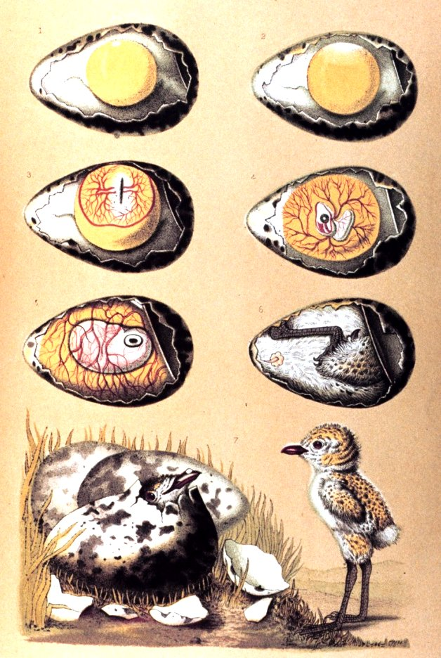 "Entwicklung eines Vogels". 1. Frisch gelegtes Ei. 2. wirkung der Bebrütung. 3. Erscheinen des Embryos. 4.+5. Entwickelung des tansitorischen Atmungsorgans (Allantois). 6. Ende der Entwicklung des Vogels. 7. Ausschlüpfen aus dem Ei und eben ausgeschlüpfter Vogel